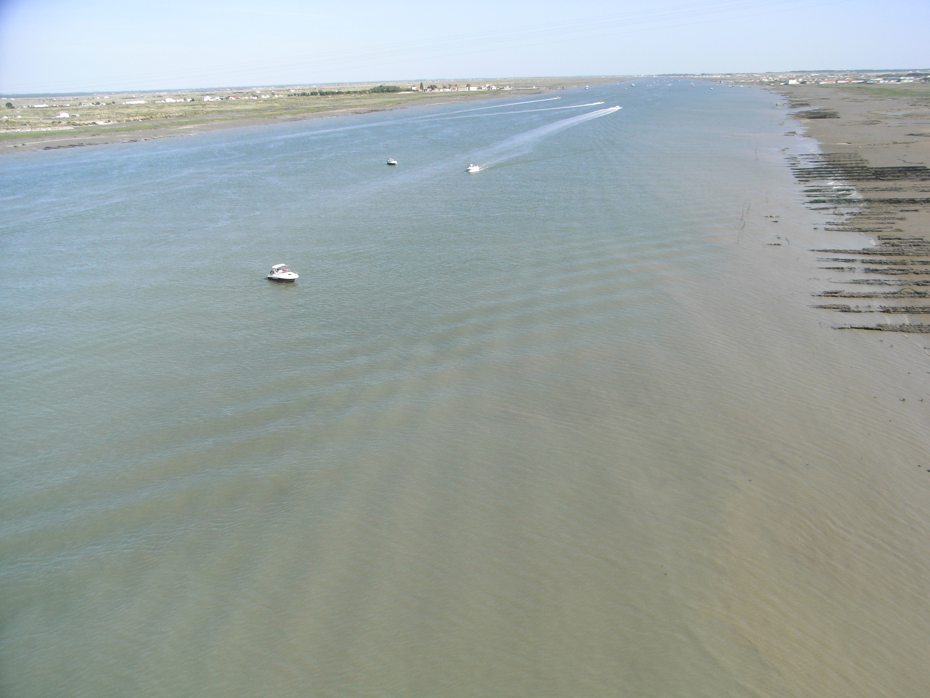 Estuaire de la Seudre en Charente-Maritime (France)